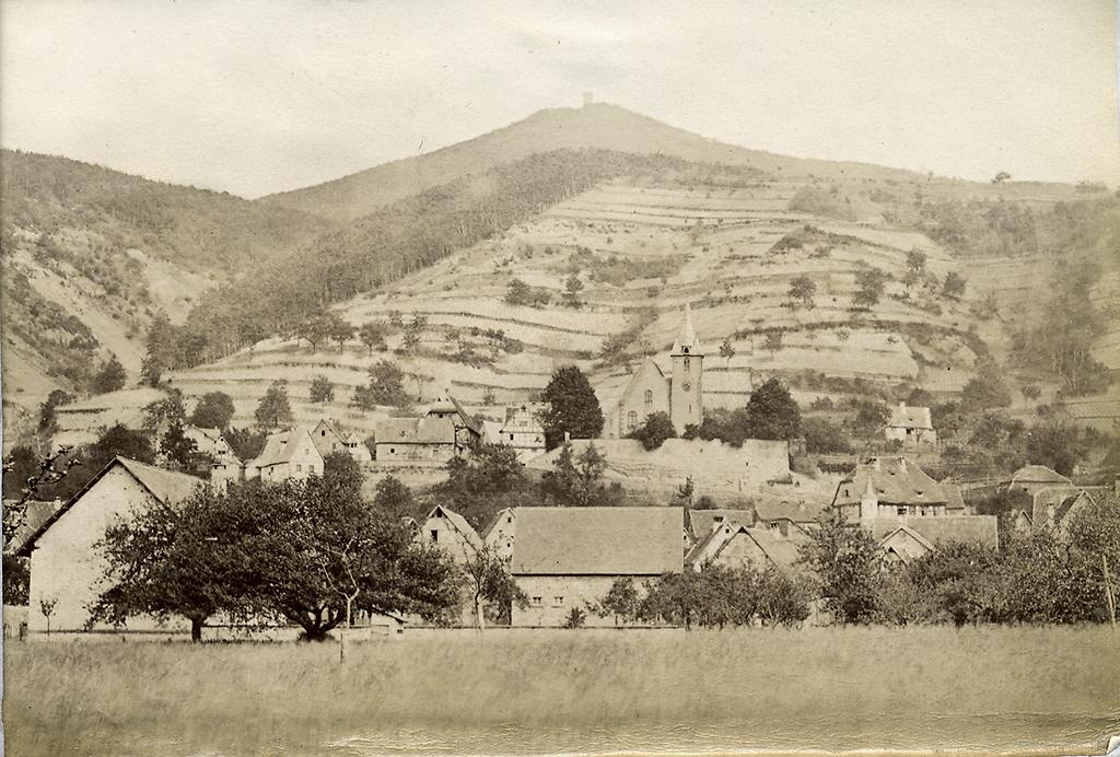 Zwingenberg und Melibocus, um 1875